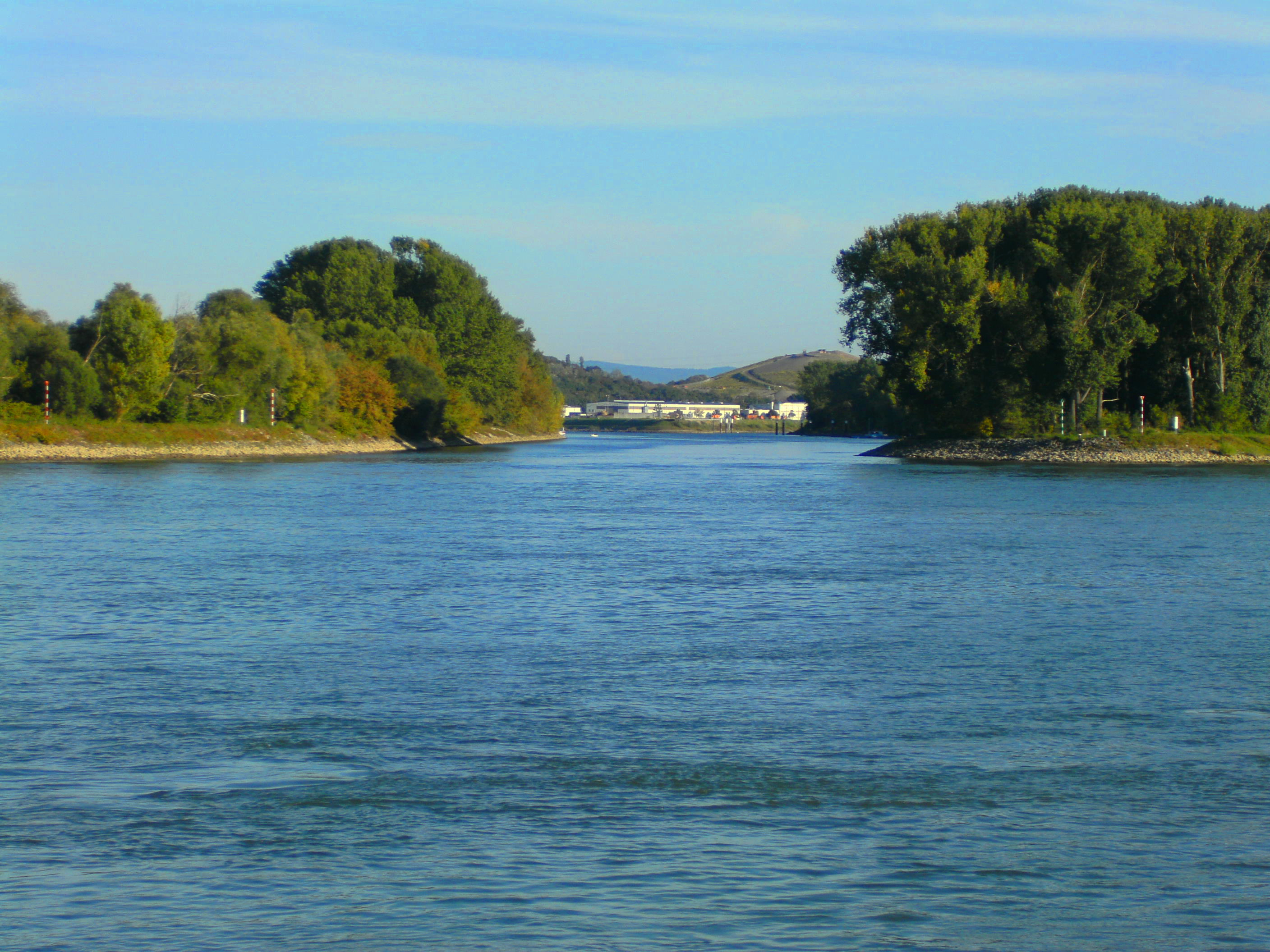 Der Altrheinarm nördlich der Neckarmündung mündet seinerseits nördlich der Friesenheimer Insel in den Rhein